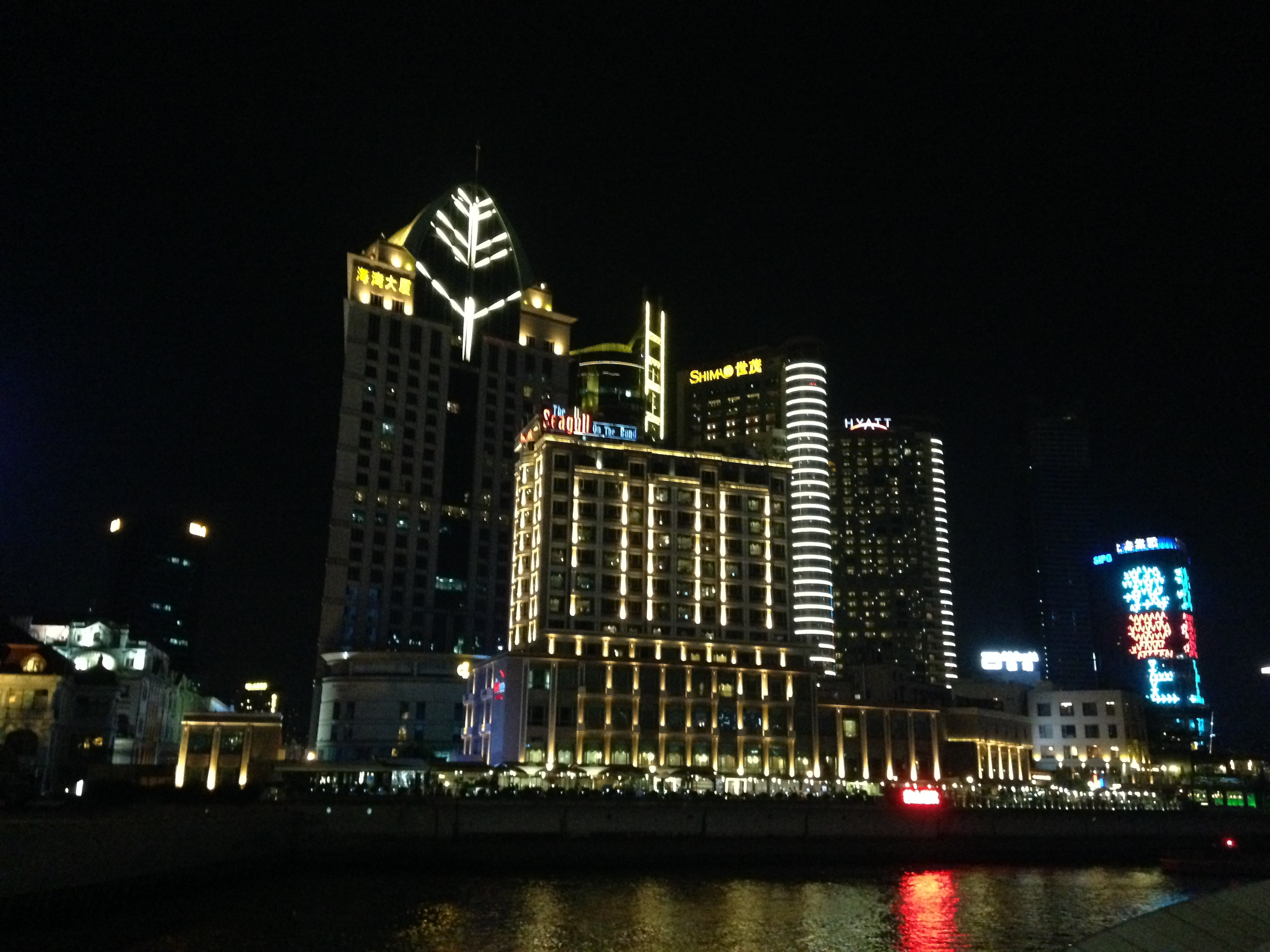 外灘より望む蘇州河対岸の夜景